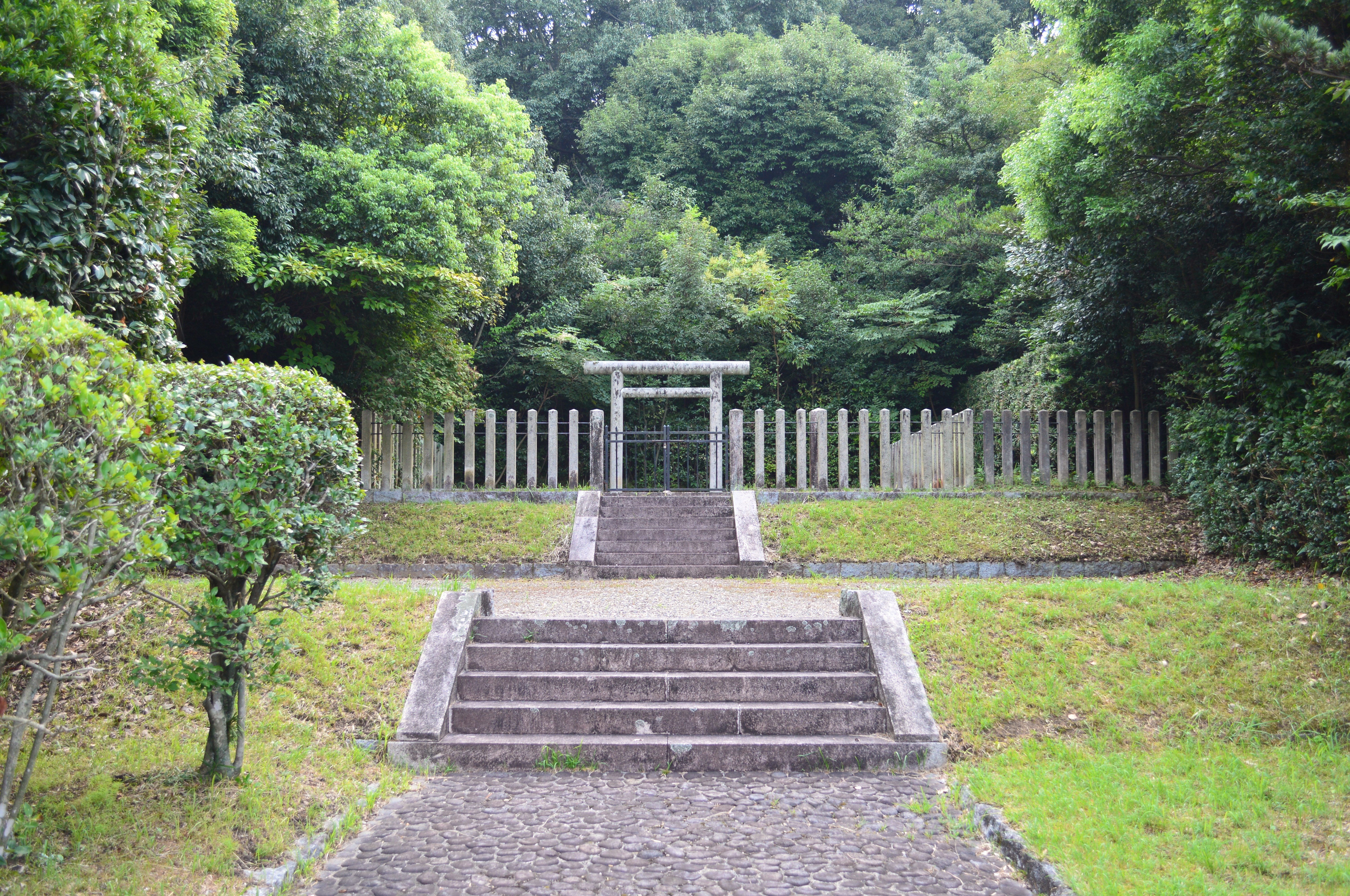 都紀女加王墓 拝所